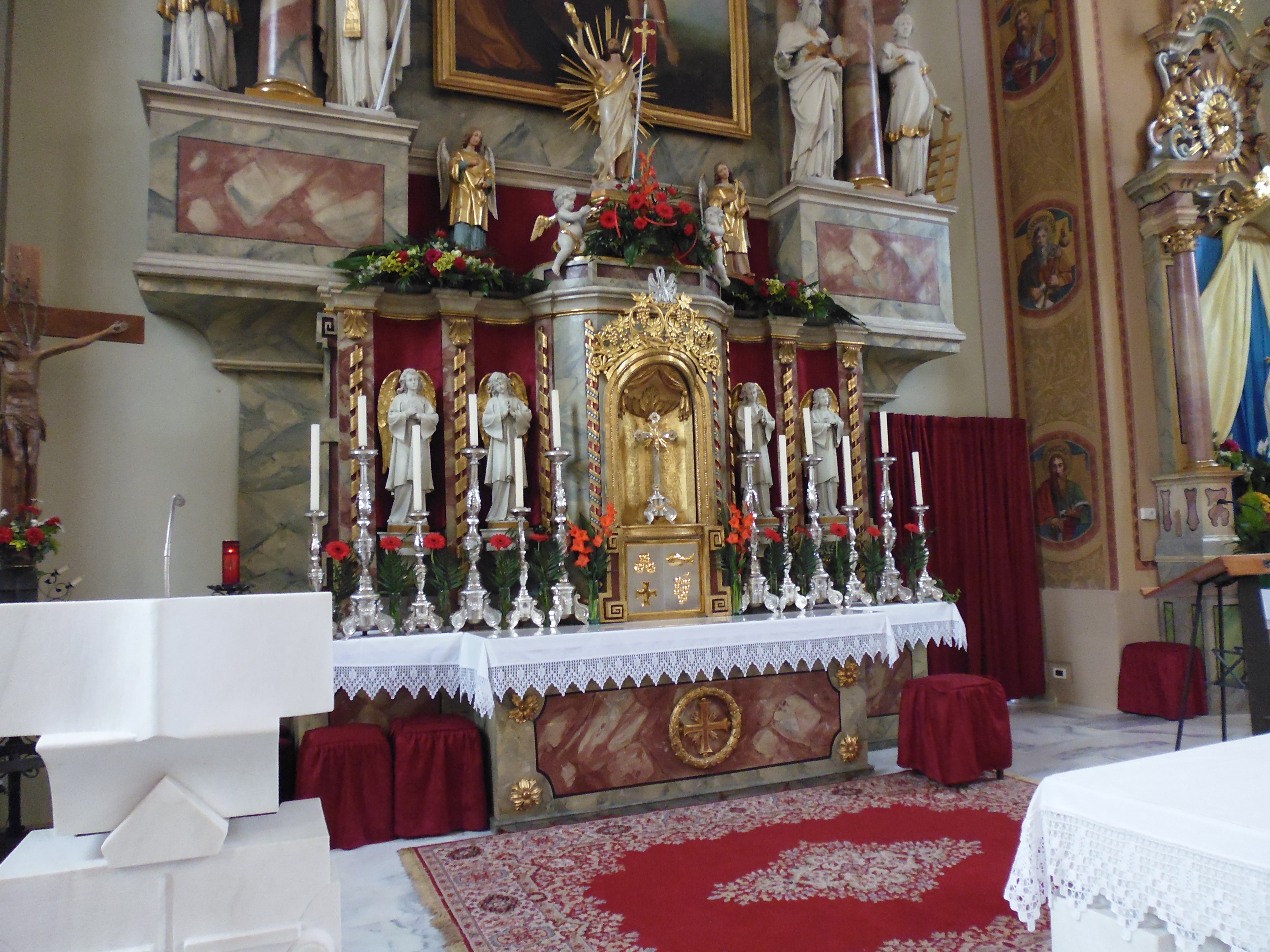 Innendetails der Pfarrkirche in Laas